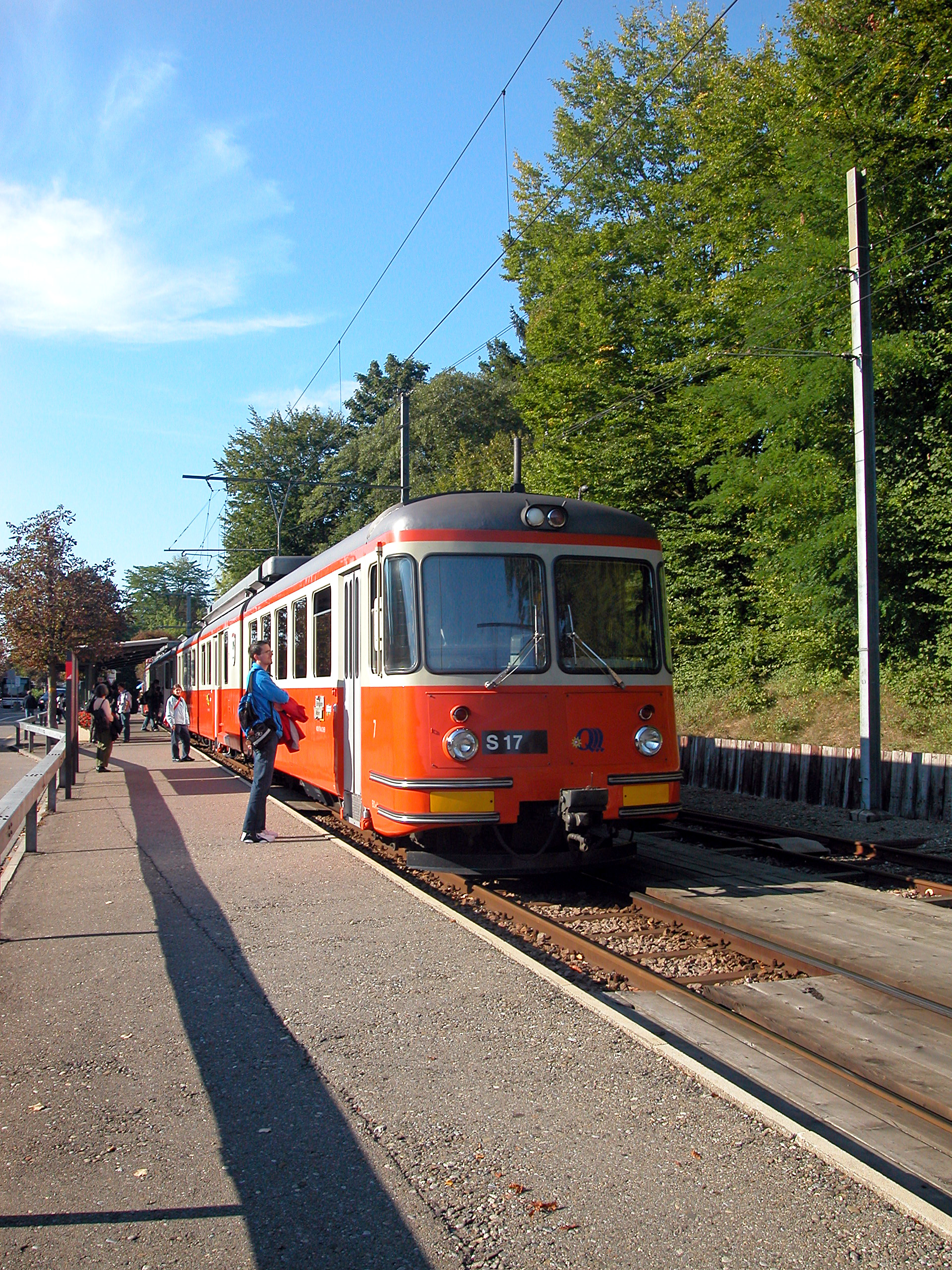 Wohlen: Bahnhof der Bremgarten-Dietikon-Bahn Alexander Umbricht, 21.09.2005